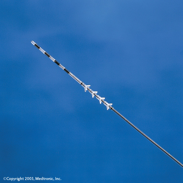 Elektrode